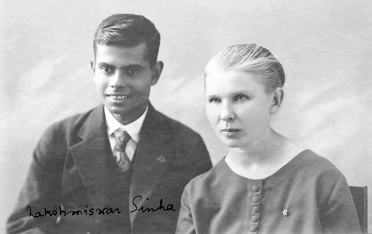 Portreto de esperantistoj Sinha Laksmiswar kaj Helmi Dresen, 1930